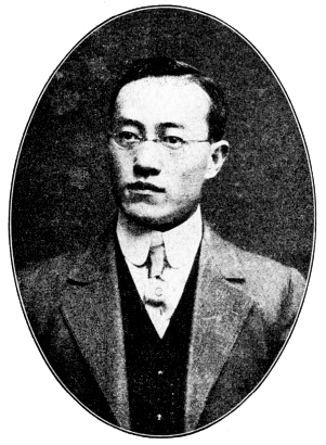 王正廷，中華民國政治人物